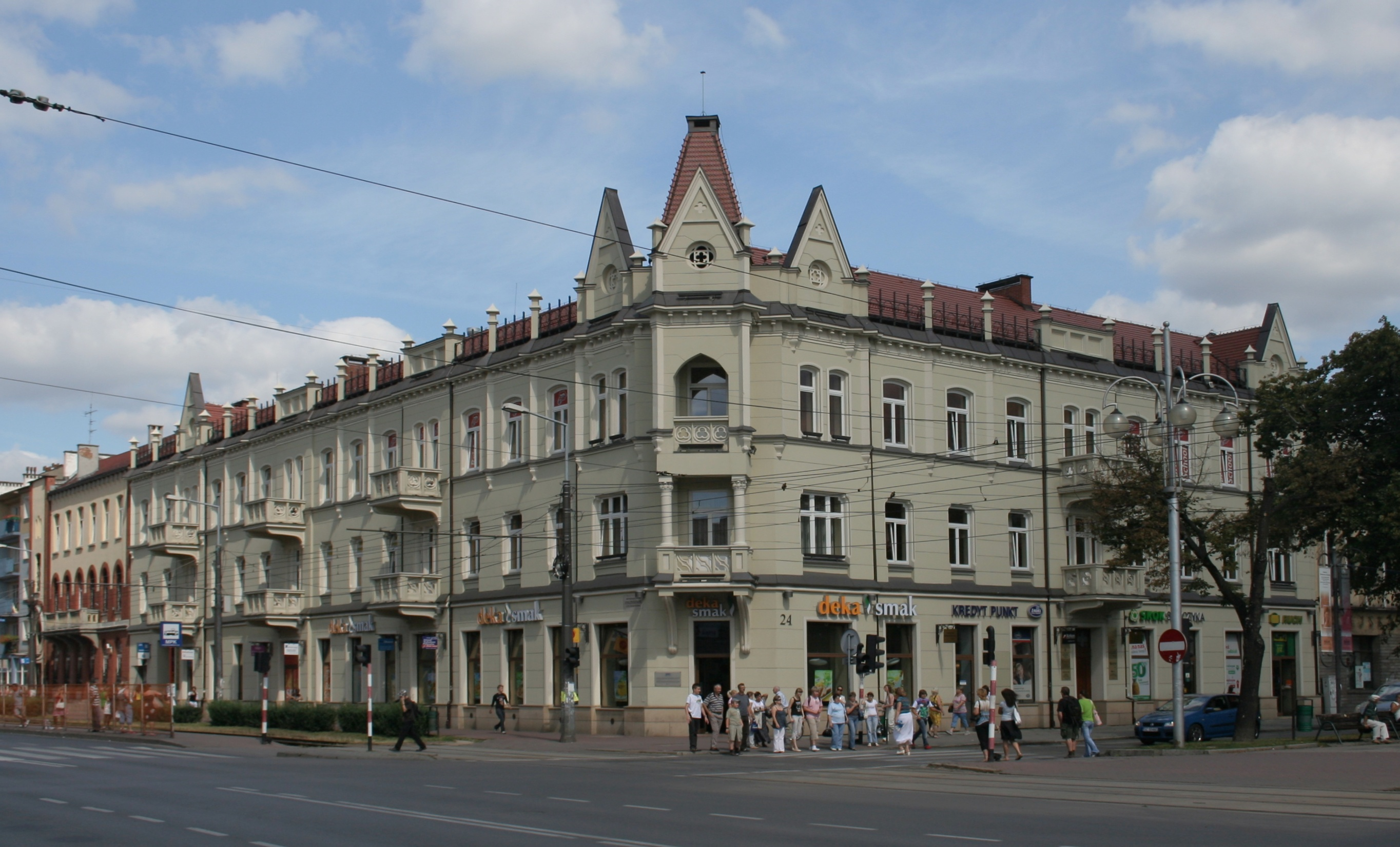 Kamienica na skrzyżowaniu Alei Kościuszki i NMP w Częstochowie.